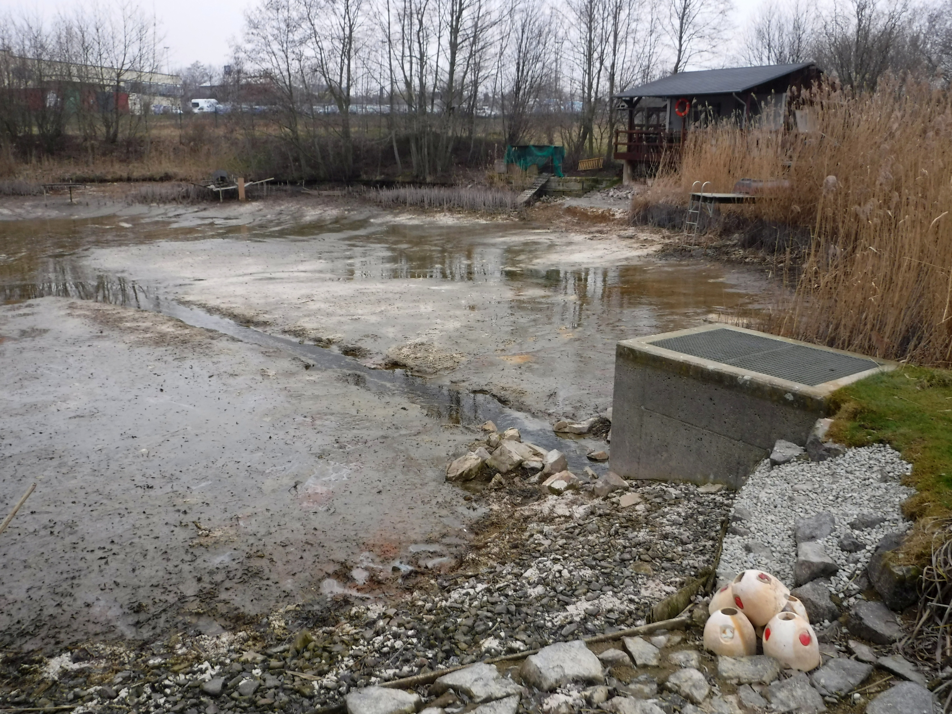 Regenklärbecken "Am großen Teich", Abwassertechnische Anlage des Abwasserzweckverbandes "Wilde Sau" (Pachtgewässer)